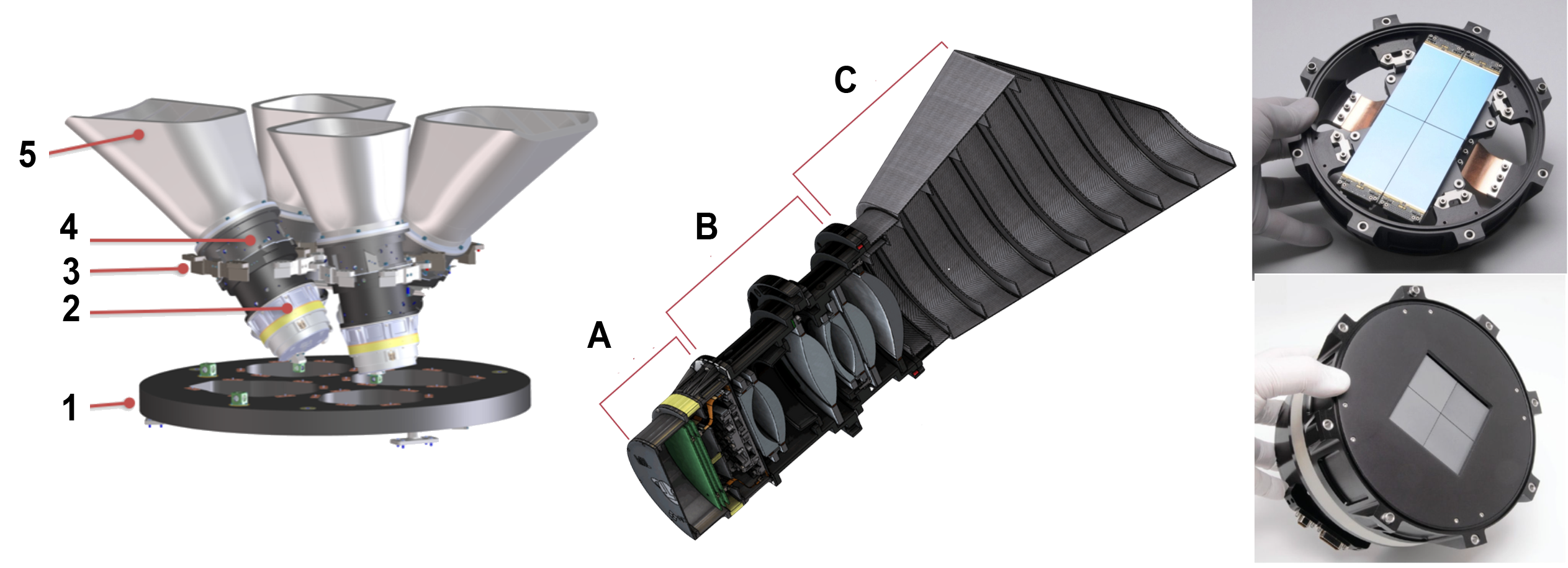 TESS Cameras